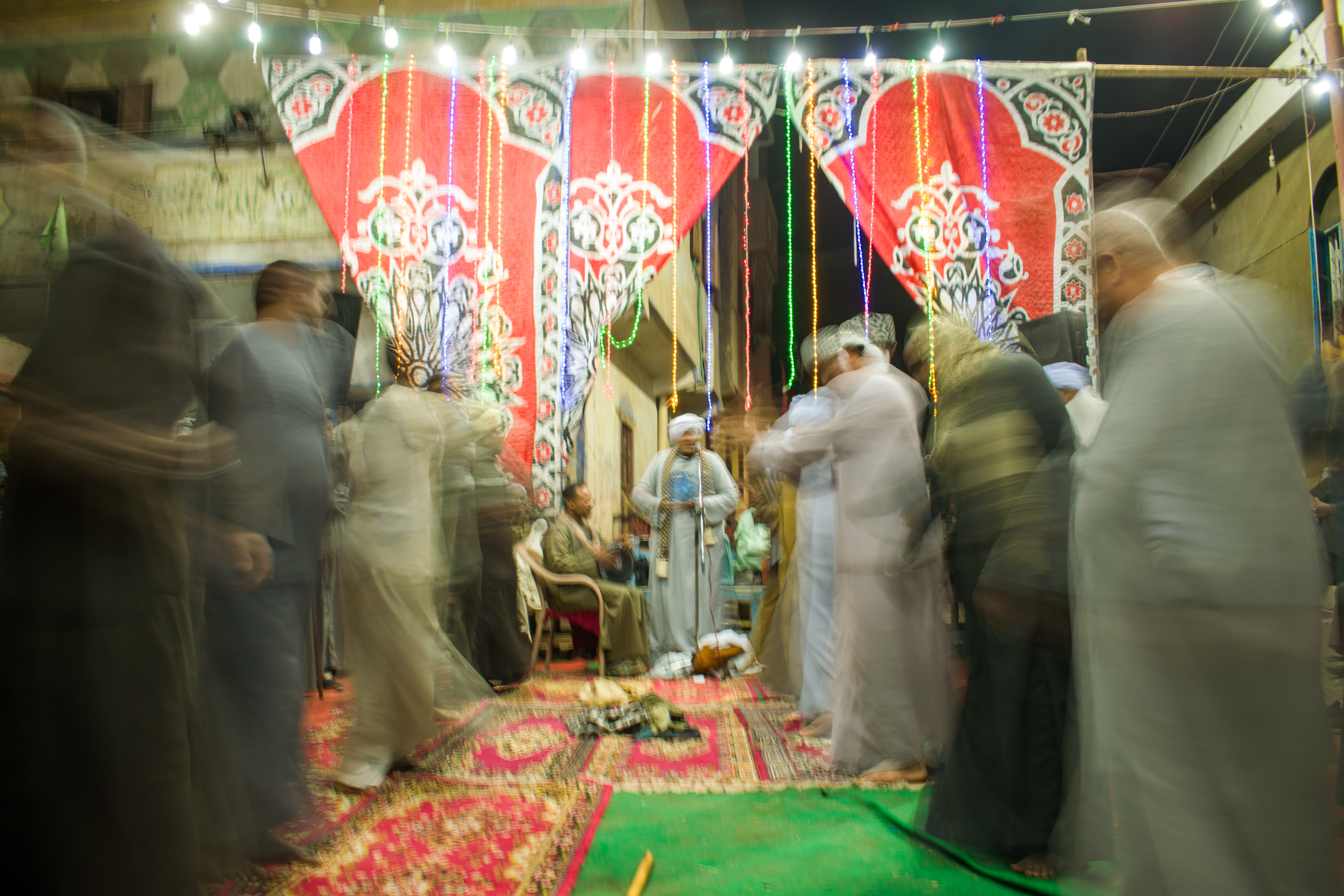 رقصة الحضرة بتوات